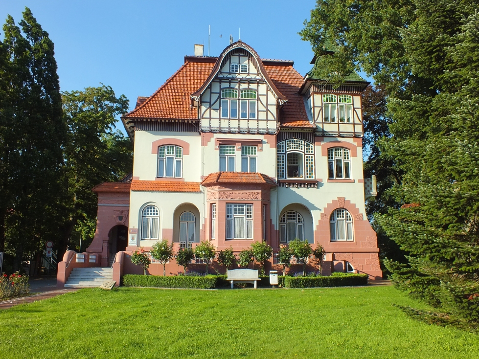 Villa Gehben in Altenbruch, Landkreis Cuxhaven